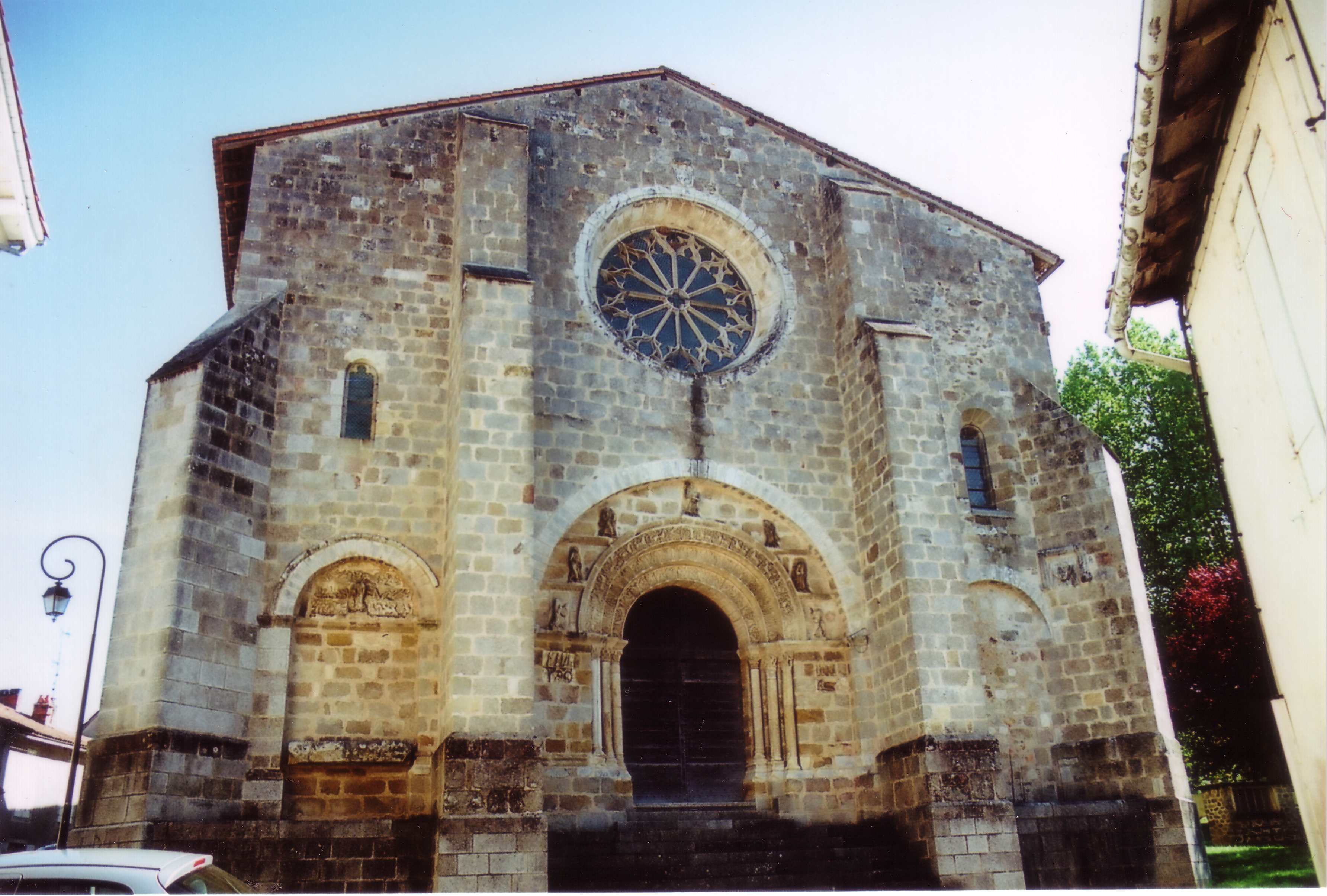 Façade de l’église abbatiale de Bussière-Badil